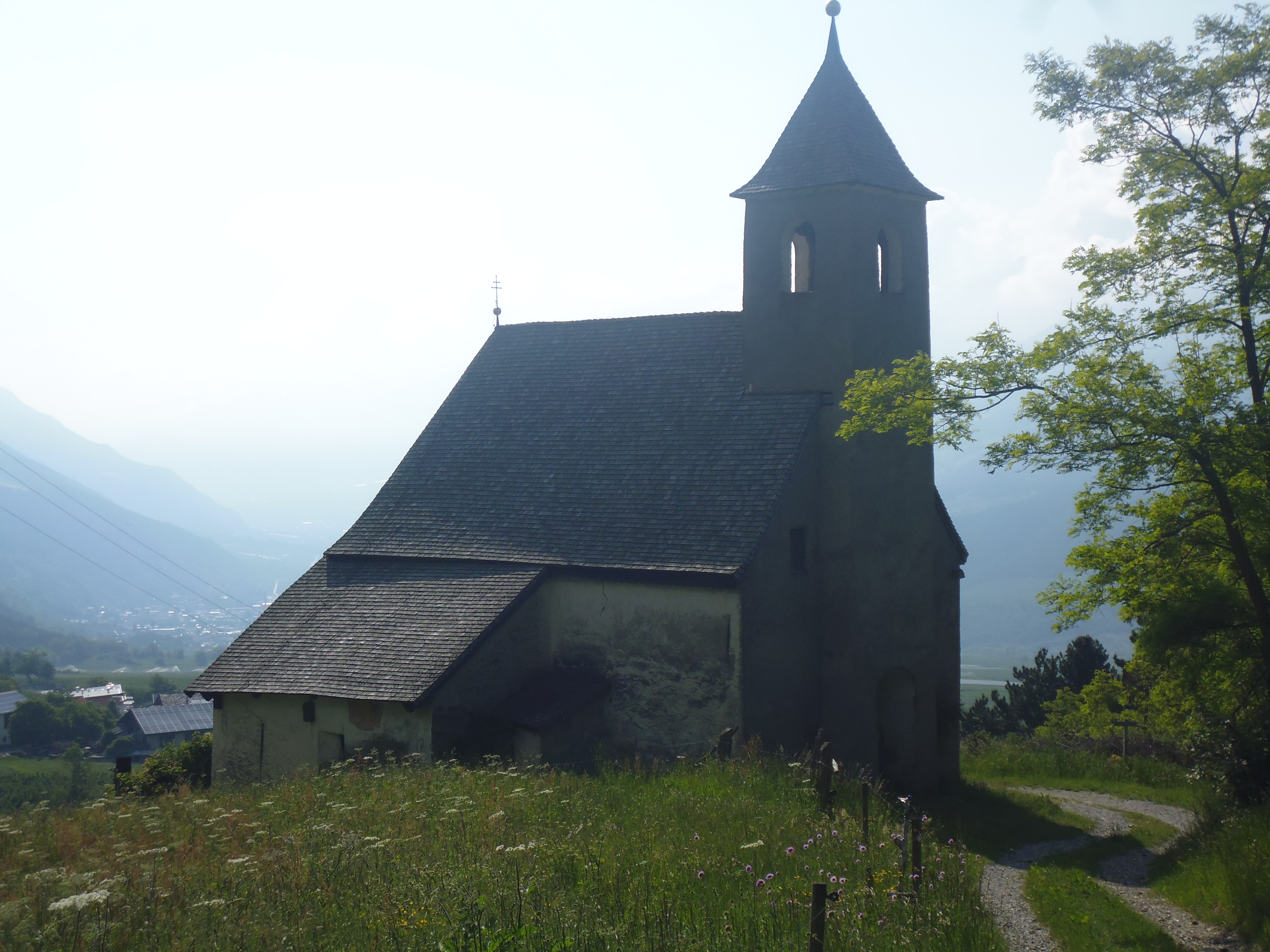 Maria Heimsuchung in Allitz